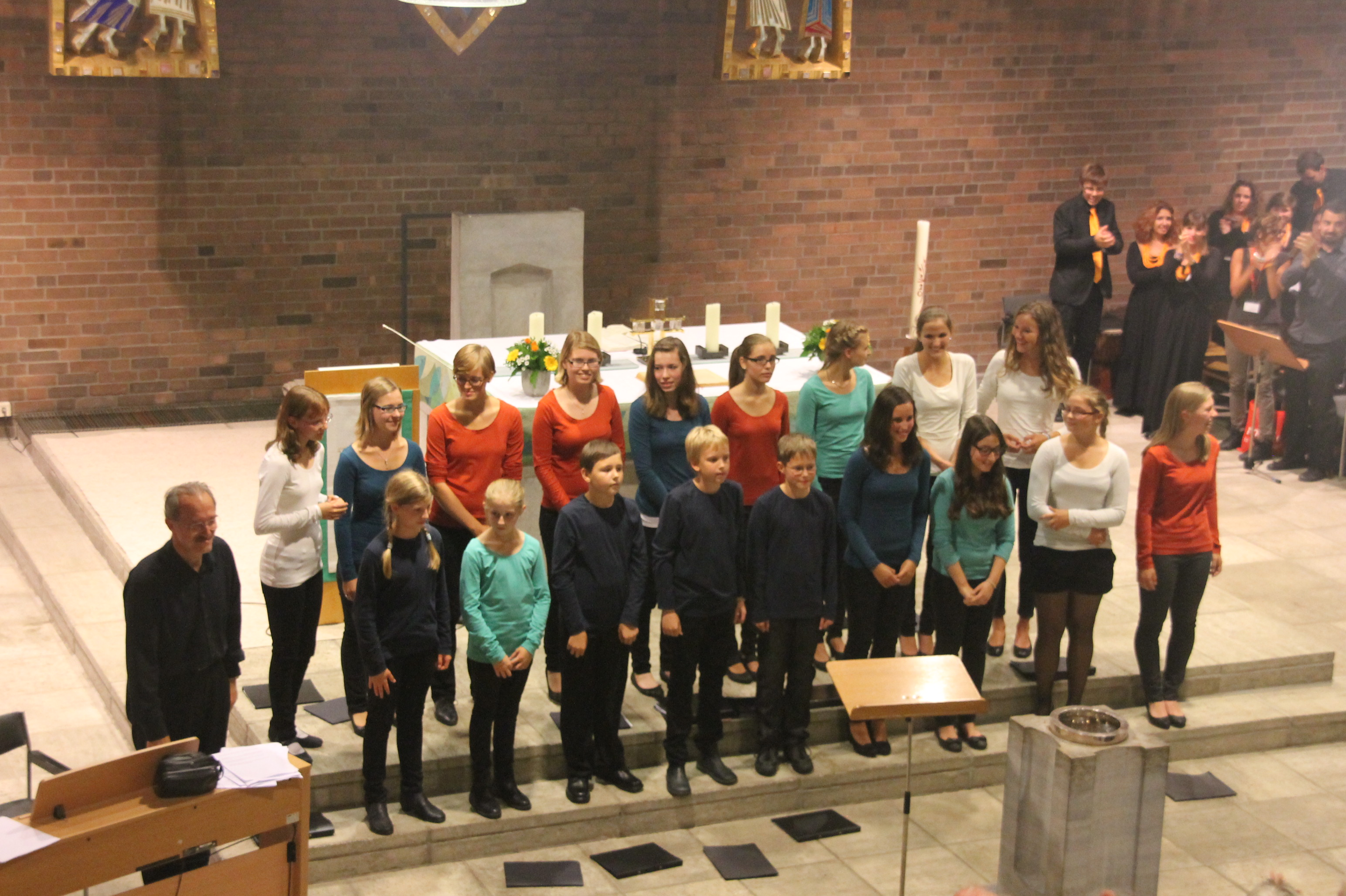 Jugendchor Belcanto Braunschweig beim Auftritt beim EUROTREFF 2013 in der Kirche St. Thomas (Wolfenbüttel) am 6.9.2013 unter Leitung von Tadeusz Nowakowski (Staatstheater Braunschweig)